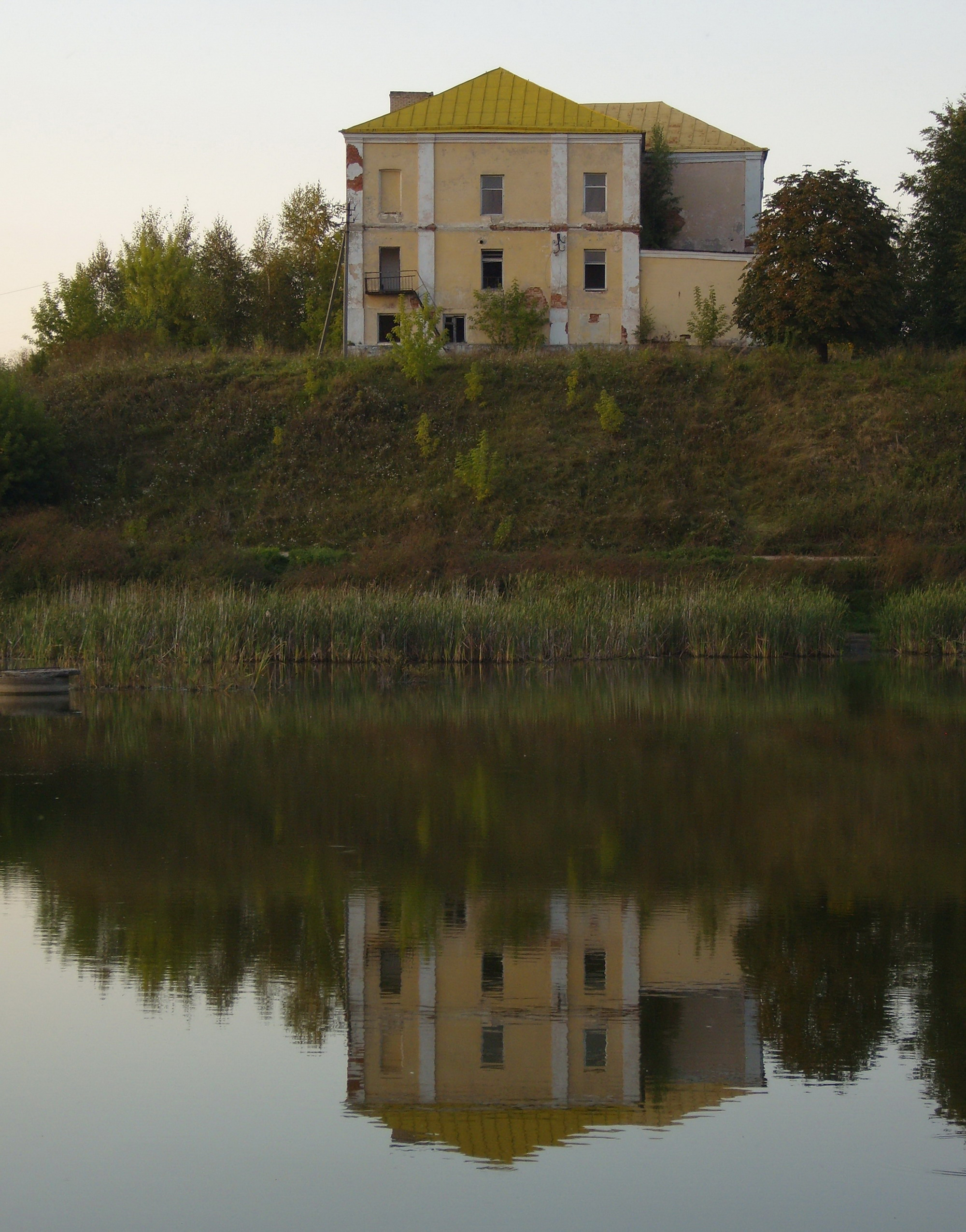 Фрагмент усадьбы Радзивиллов.